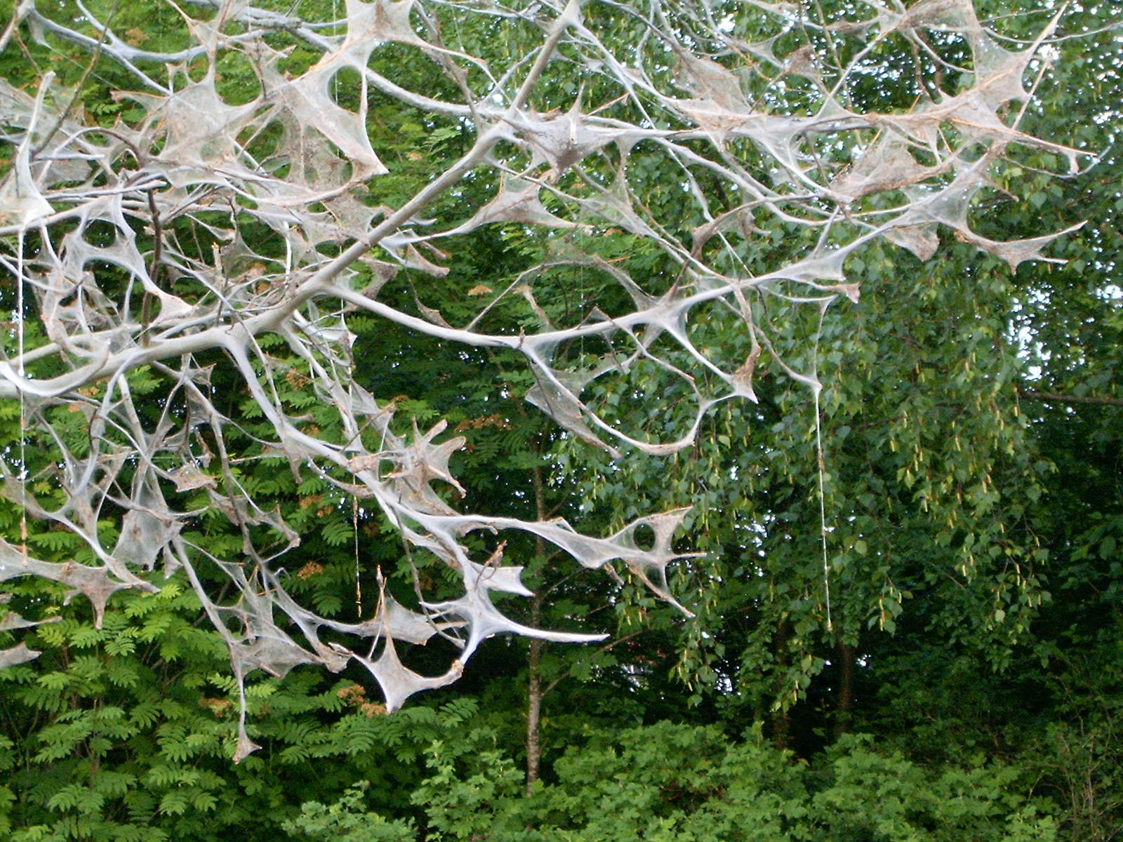 Yponomeuta Evonymella (häggspinnmal, spökträd, ghost tree)